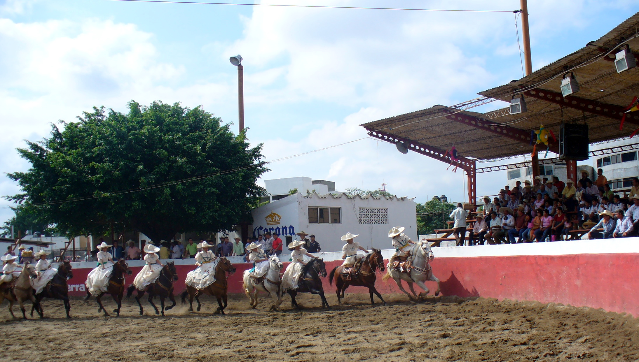 Escaramuza realizando El Abanico